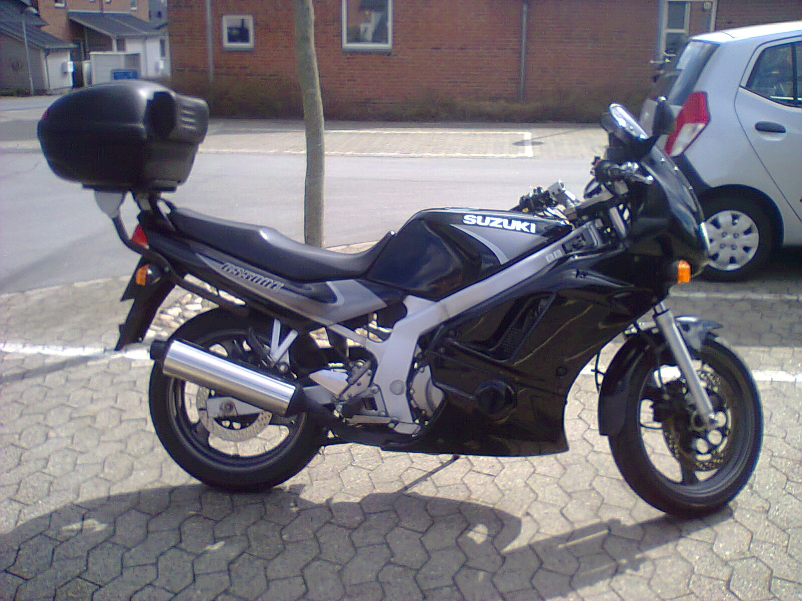 Suzuki GS500E Årgang 2003